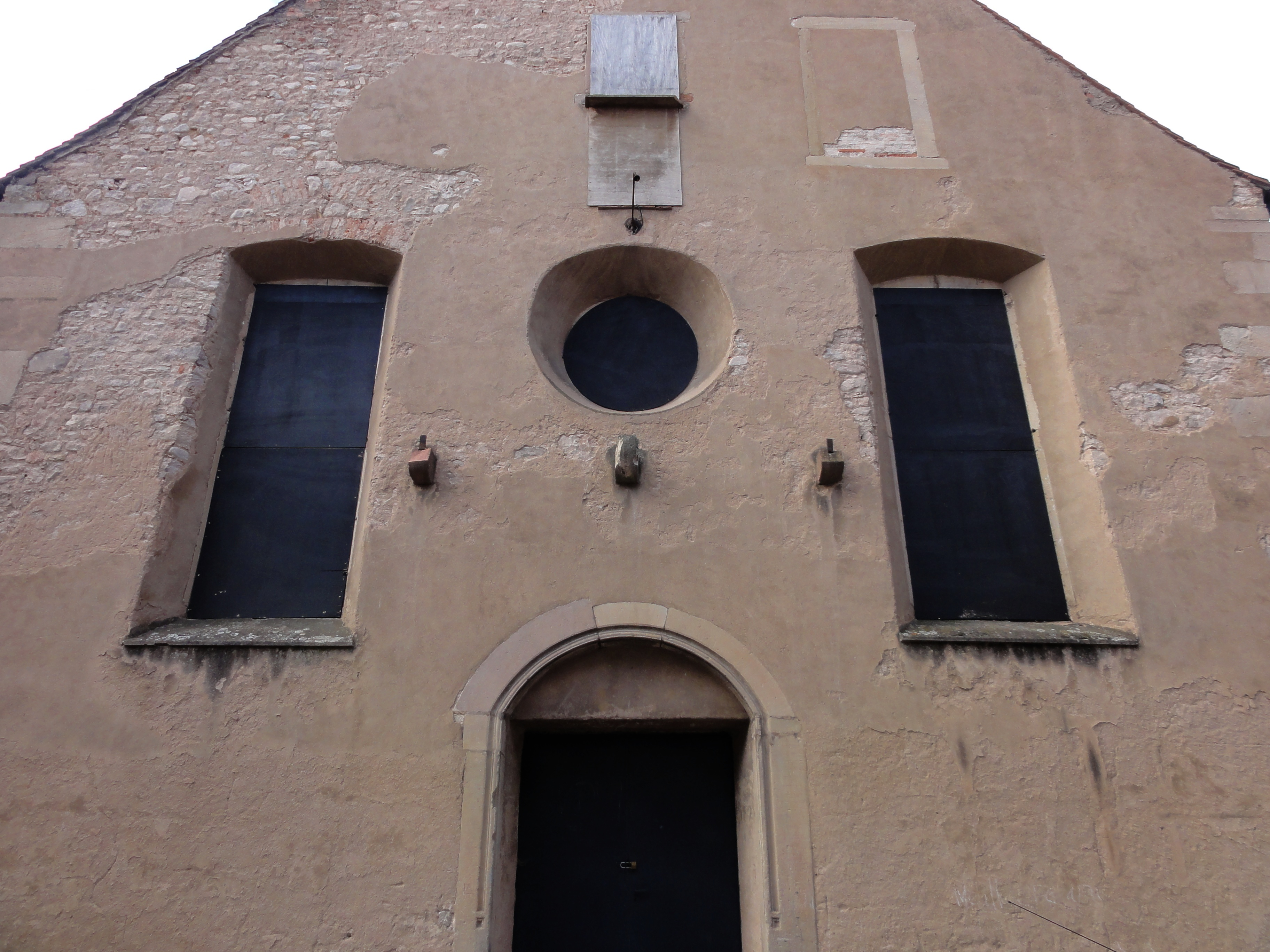 Alsace, Bas-Rhin, Obernai, Ancien Couvent de Capucins dit St-Antoine de Padoue (XVIIe-XVIIIe). .